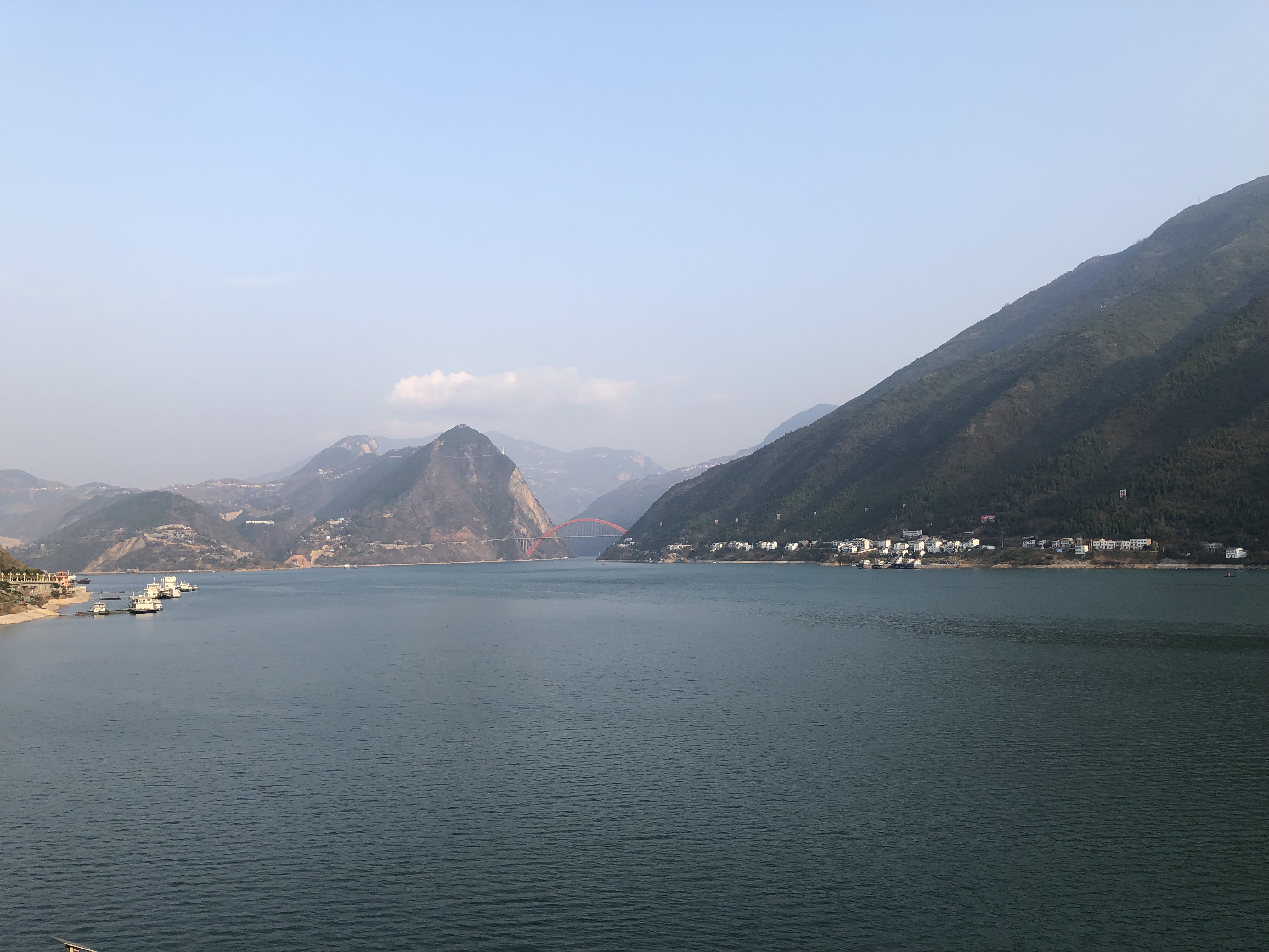 中文（中国大陆）: 巫山县、巫峡和巫山长江大桥